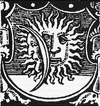 Знак Скарыны